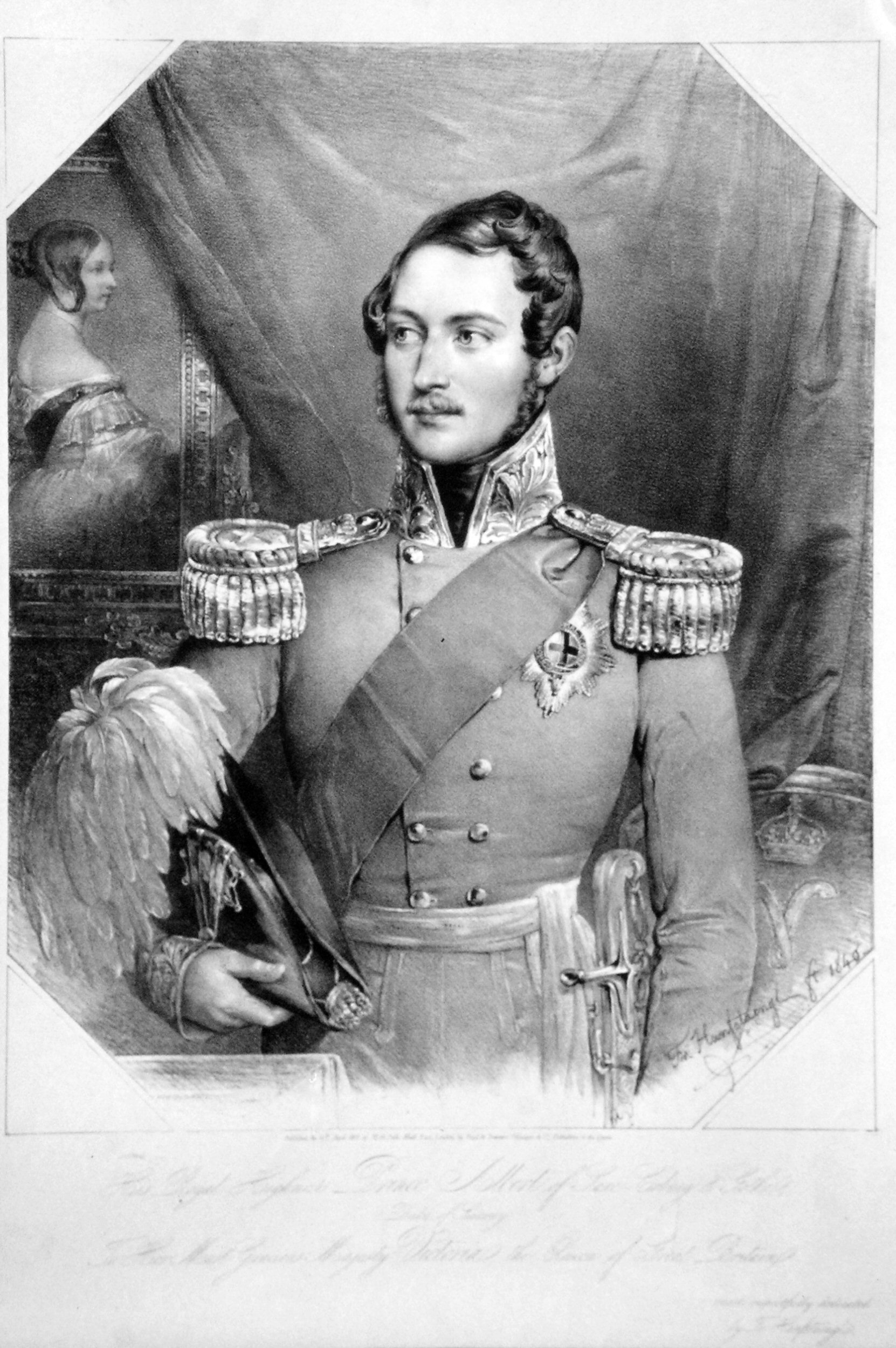 Albert von Sachsen-Coburg und Gotha, Lithographie von Franz Seraph Hanfstaengl